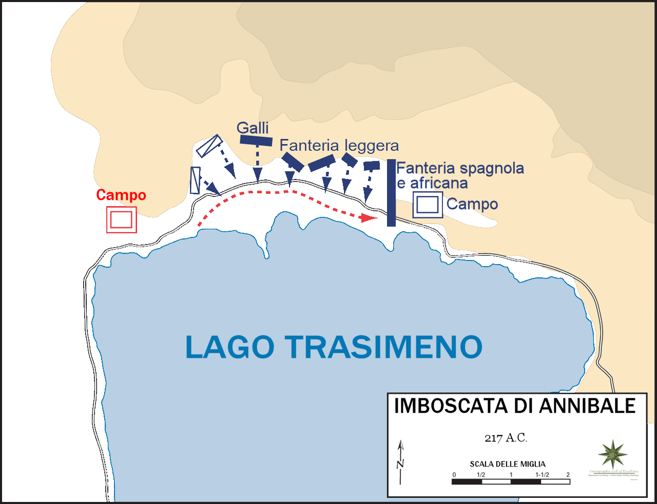 Traduzione di File:Battle of lake trasimene.gif in versione png